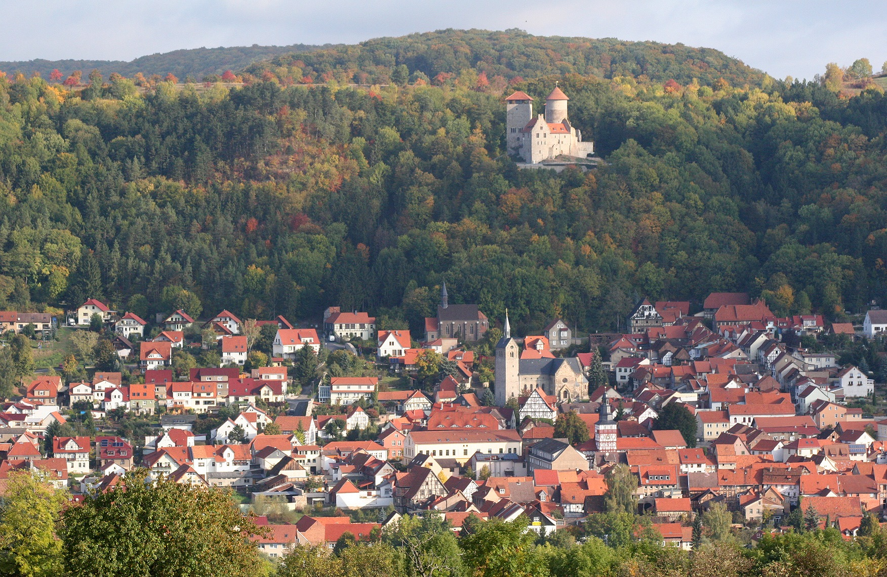 treffurt vom sandberg